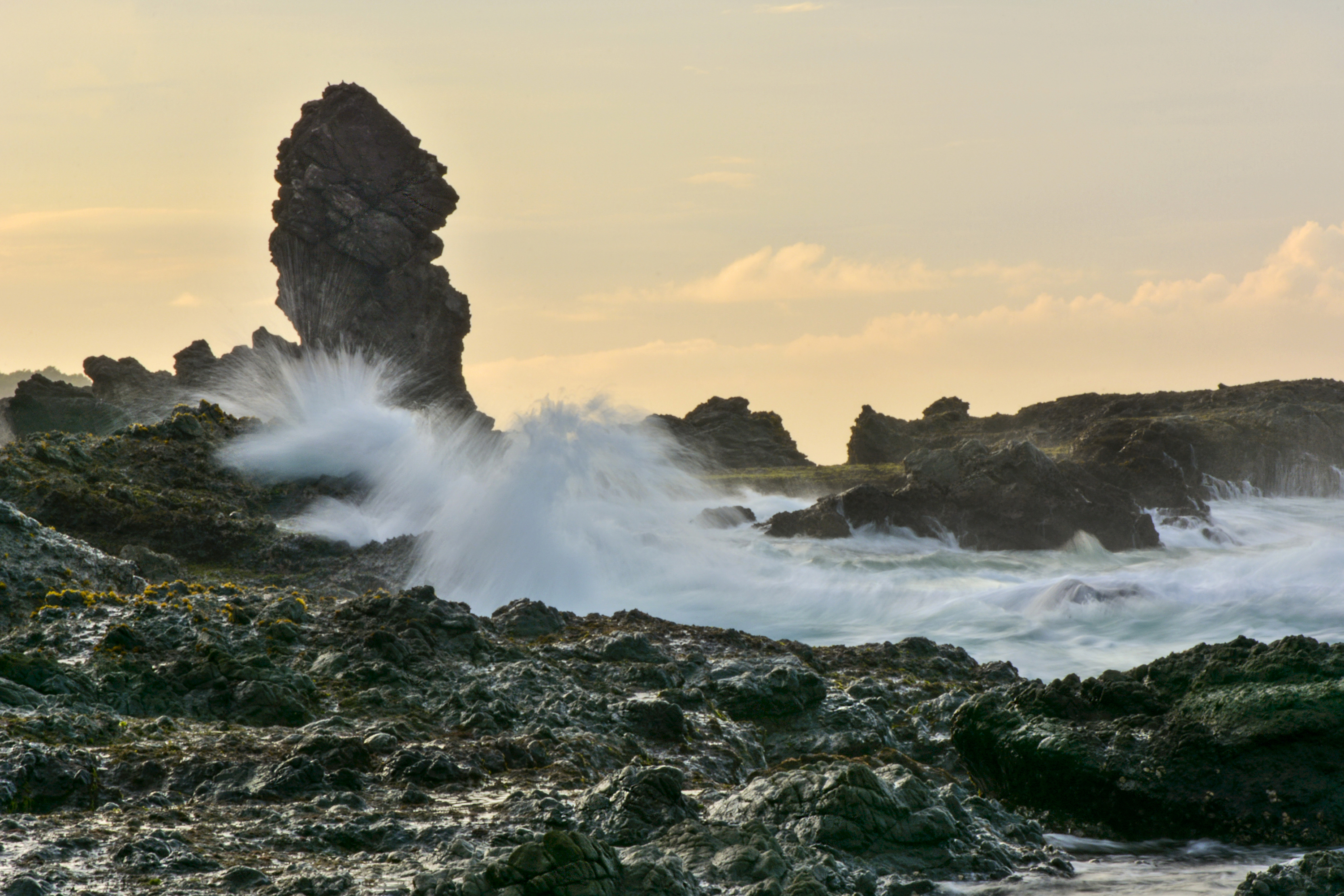 Togog adalah salah satu karakter dalam wayang, yang dicirikan dengan penampilan fisiknya yang pendek, hidung besar, dan bermulut dower. Di sisi timur Pantai Siung terdapat stack dengan bentuk menyerupai tokoh Togog, sehingga penduduk lokal menyebutnya sebagai Watu Togog. Materialnya adalah batuan vulkanik seperti breksi vulkanik, lava, andesit, dan terobosan mikrodiorit yang diperkirakan berumur 40 juta tahun. Material vulkanik yang menyusun kawasan Pantai Siung sisi timur berbeda dengan sisi barat yang didominasi batuan kapur. Untuk mencapai Watu Togog disarankan mengajak penduduk lokal atau para pemancing dan pencari lobster yang hafal dengan karakter pasang-surut laut, karena sangat berbahaya. Pada saat air laut pasang, kawasan ini digempur ombak besar yang mematikan.